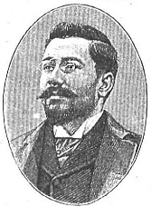 Retrato de Juan Vázquez de Mella, publicado en la revista española Nuevo Mundo.